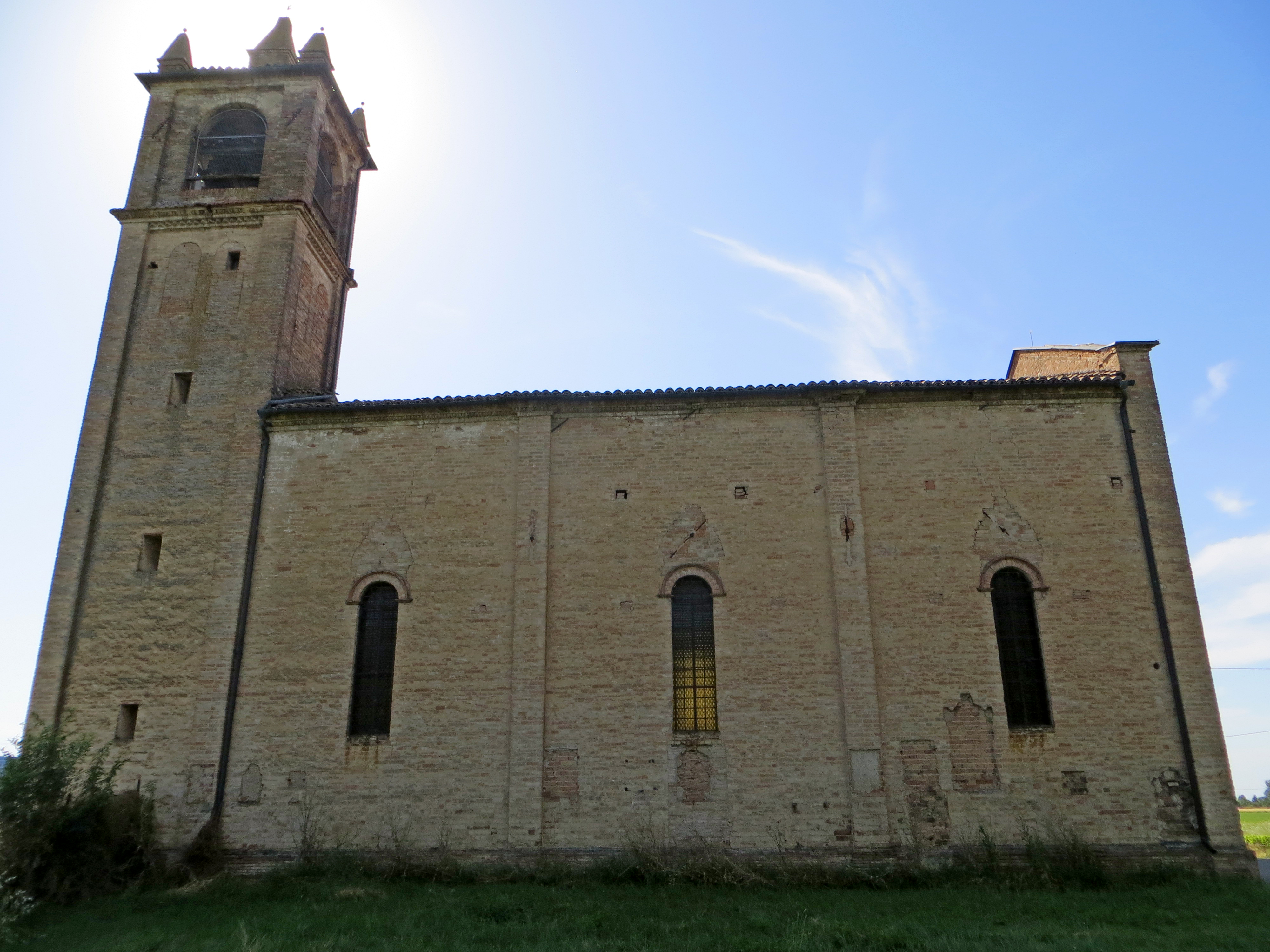 Chiesa di San Giovanni Battista (Pedrignano, Parma) - lato est